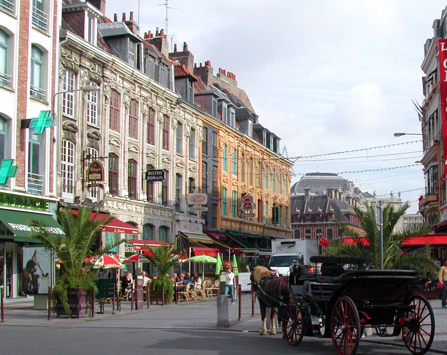 Place Rihour N° 2 à 24 Lille Nord (département français) .